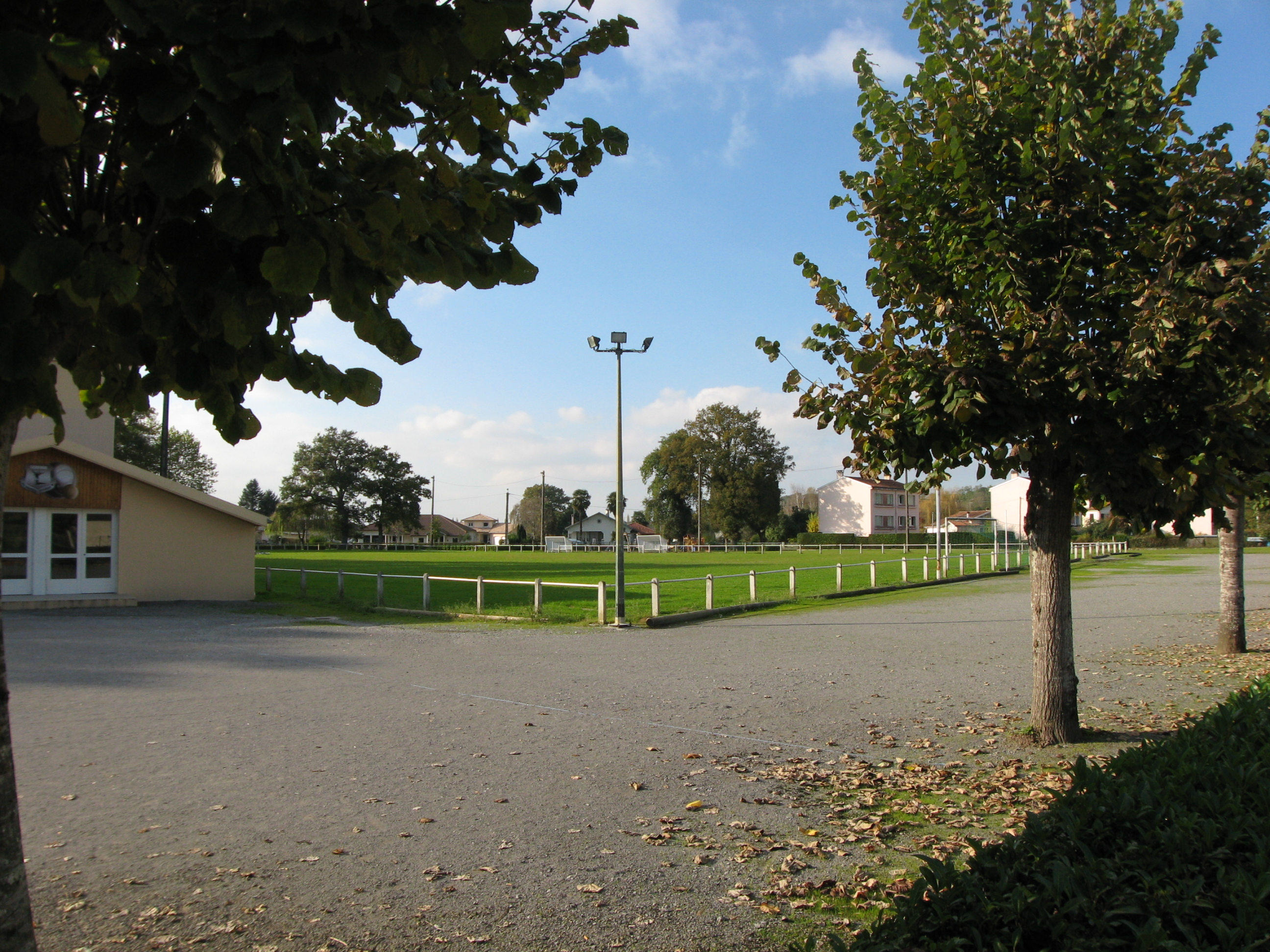 Vue du stade de Ledeuix (Pyrénées Atlantiques) Pyrénées).